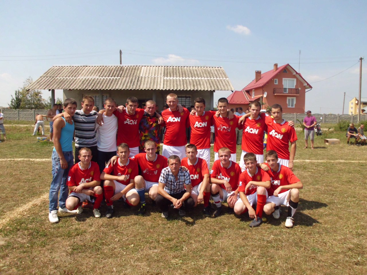 ФК Каменяр